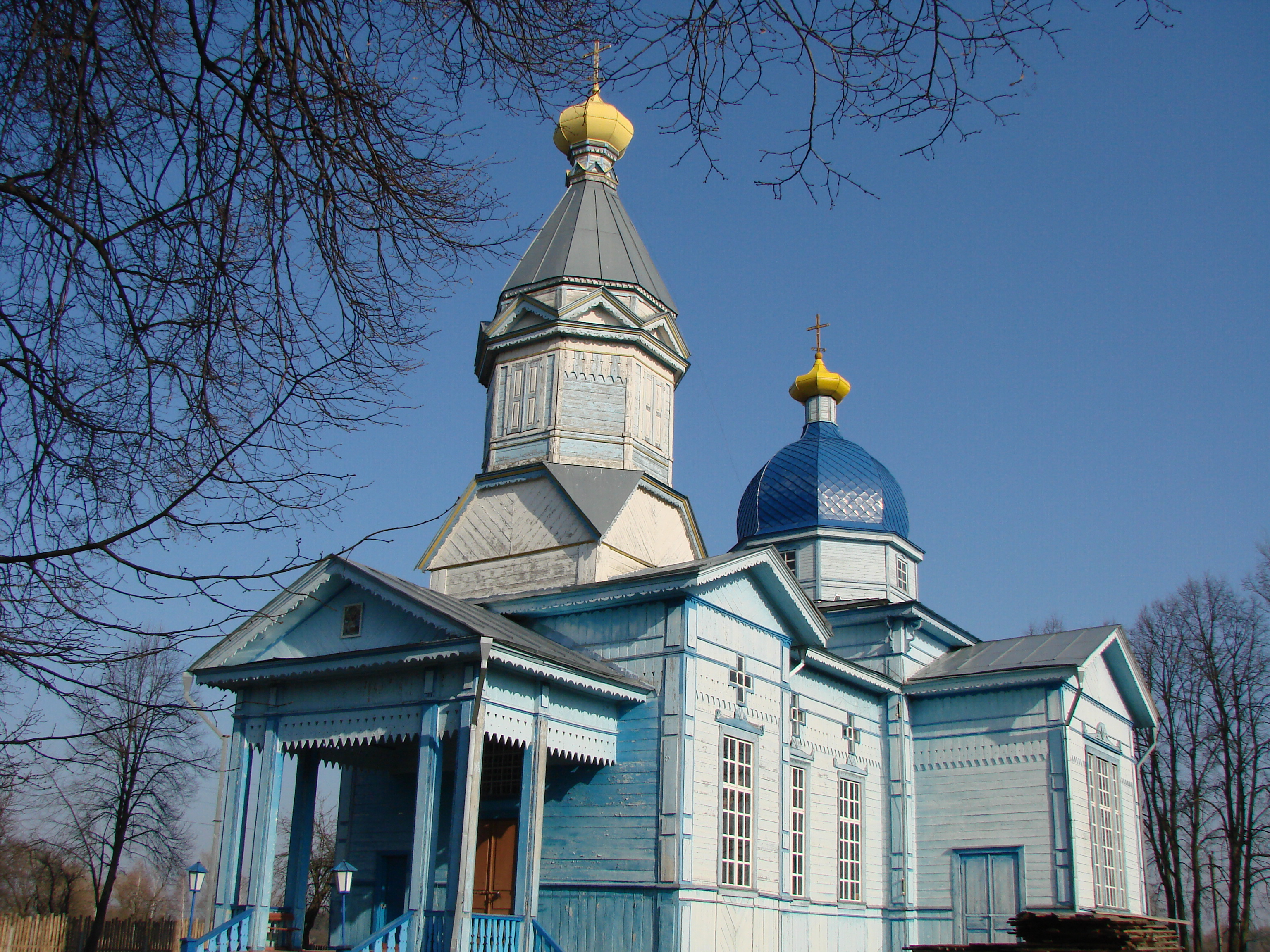 Церква Різдва Богородиці (дер.), село Мусійки